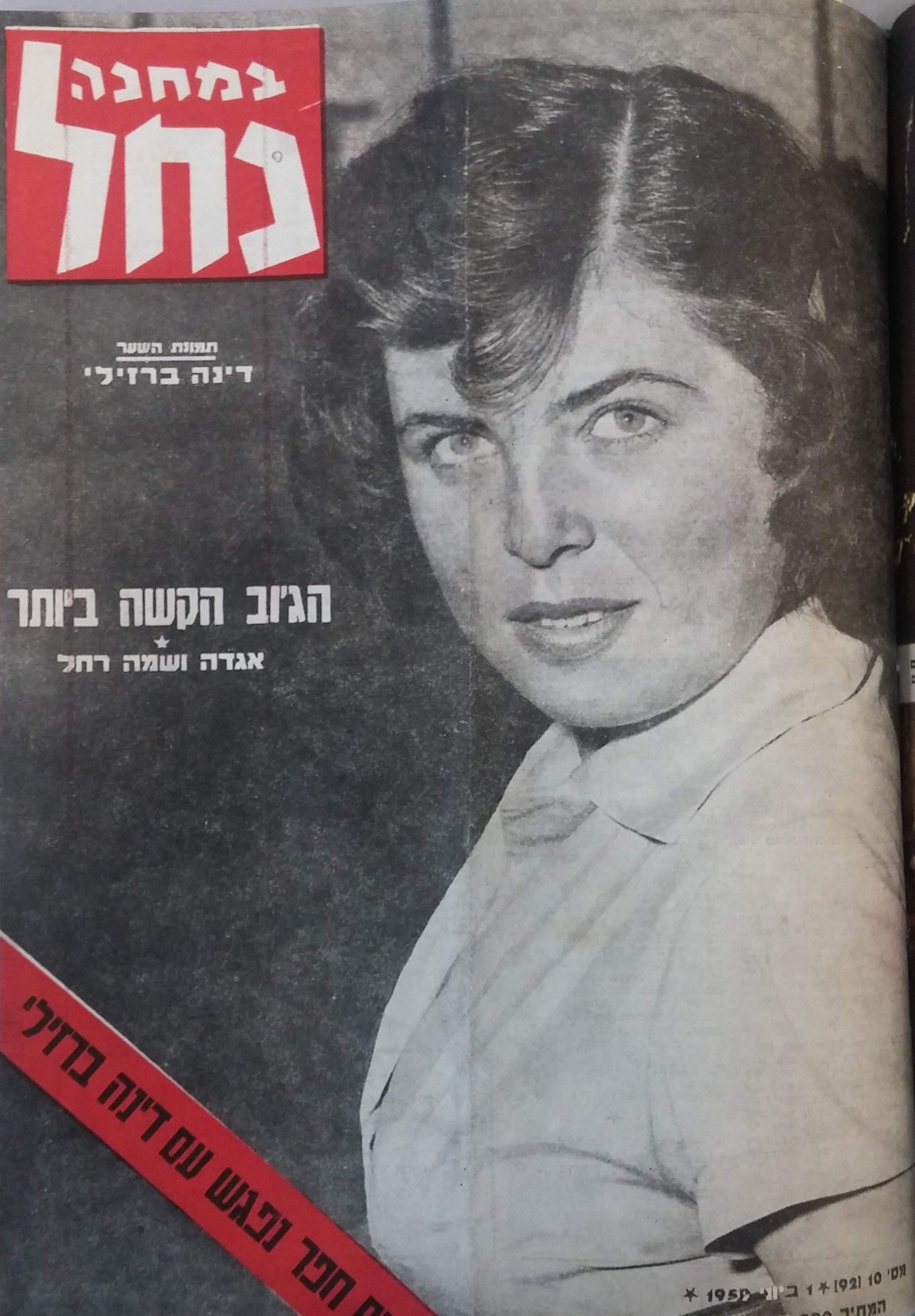 Bamahane Nahal